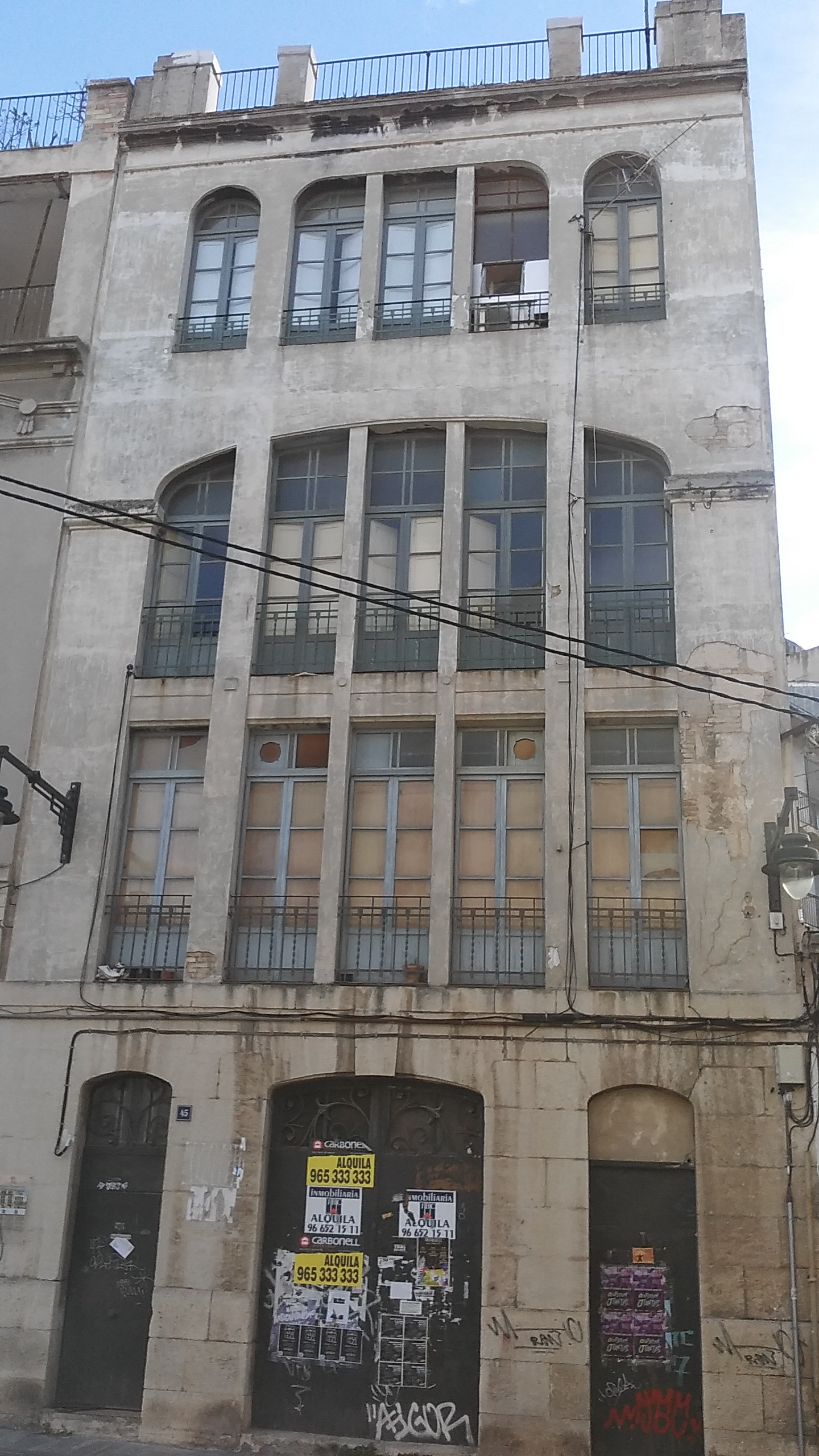 Fabrica en carrer Sant Joan 45 d'Alcoy (Alacant).